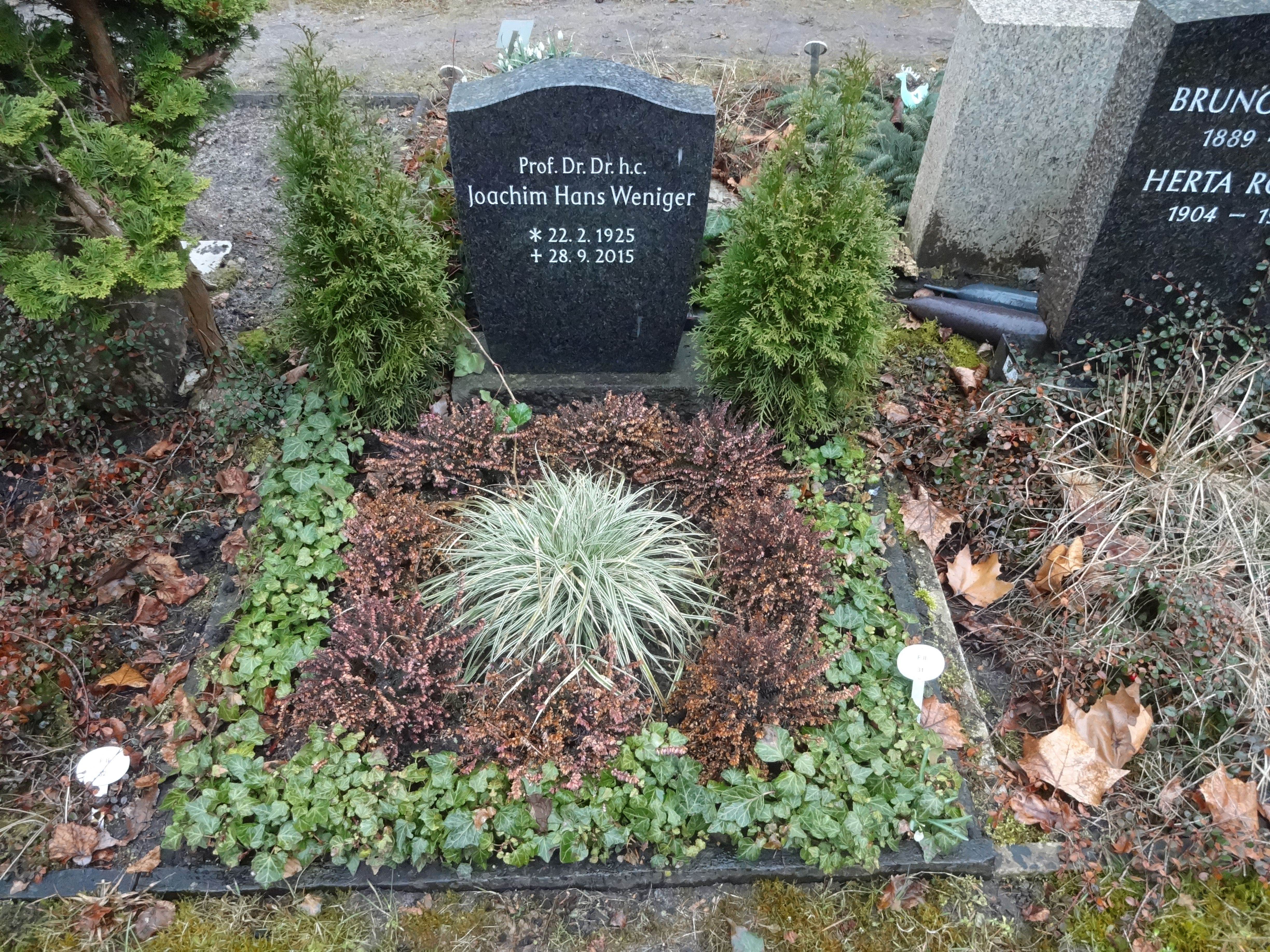 Grab von Prof. Dr. Dr. Joachim Hans Weniger auf dem Evangelischen Kirchhof Nikolassee